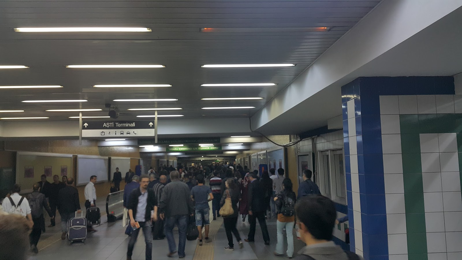 AŞTİ Şehirler Arası Otobüs Terminali, Ankara, 2015.